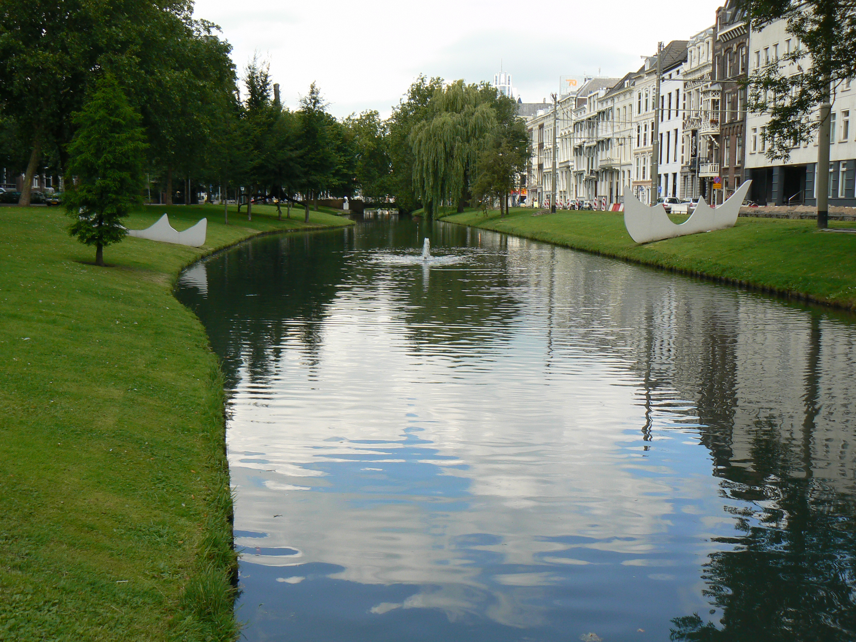 sculpture Richard Artschwager in Rotterdam/The Netherlands (FOP)